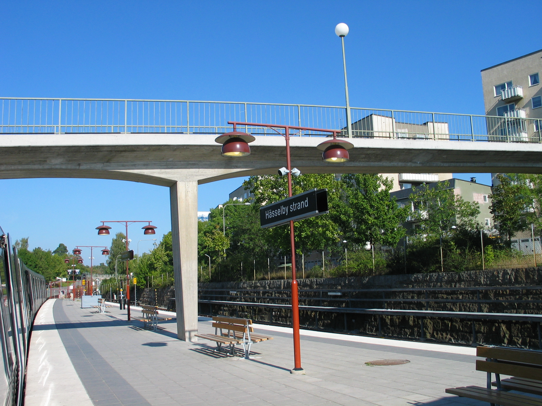 Hässelby Strand, a metro station in Stockholm, Sweden.